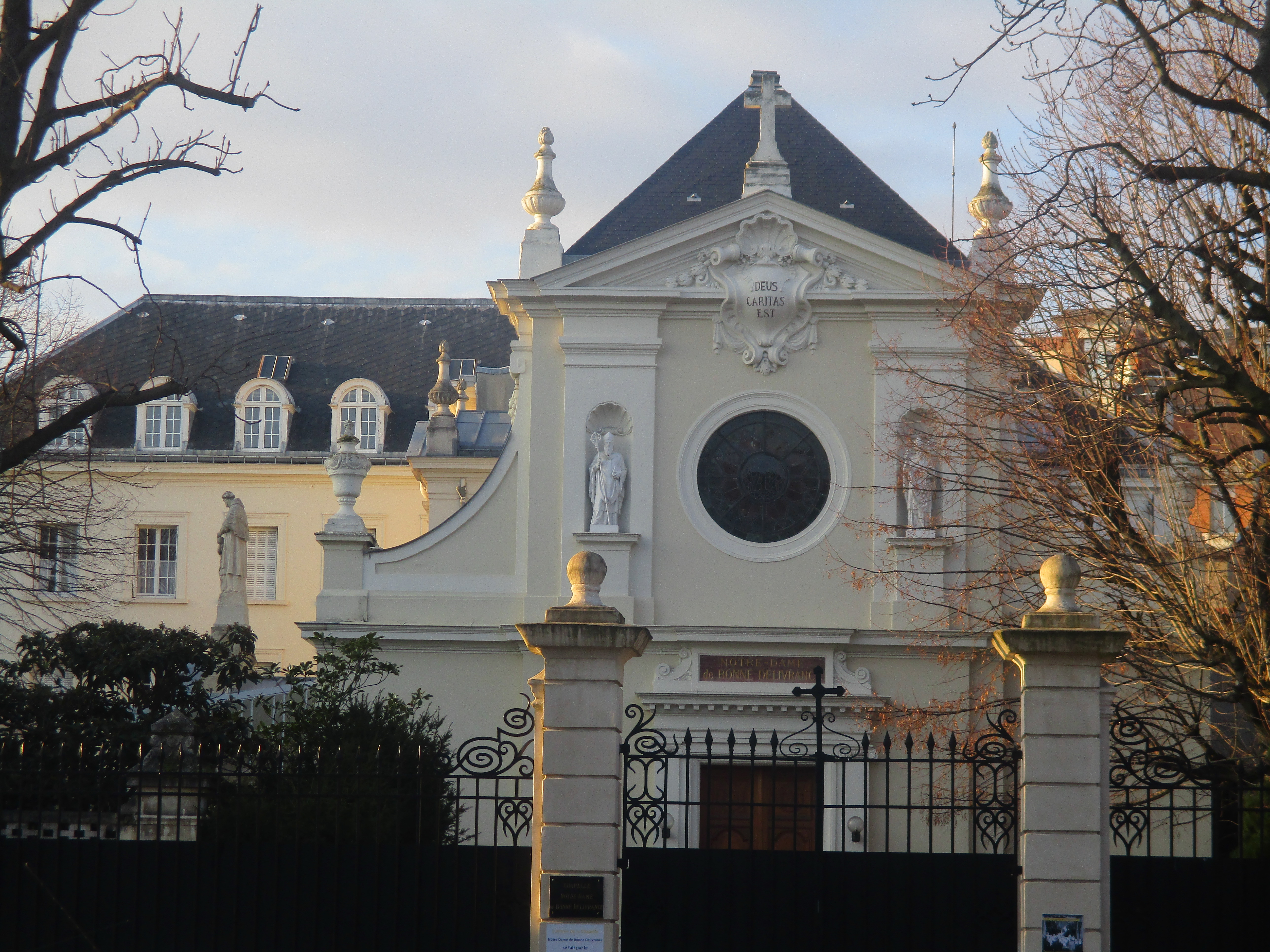 Chapelle Notre-Dame de Bonne Délivrance, desservant la maison-mère des religieuses hospitalières de Saint-Thomas de Villeneuve, à Neuilly-sur-Seine. Elle possède une Vierge noire.